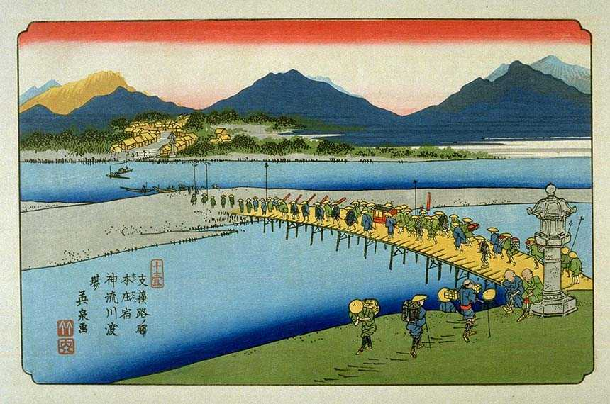 Honjo on the Kisokaido, ukiyo-e prints by Keisai Eisen